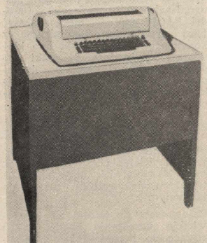 IBM 2741